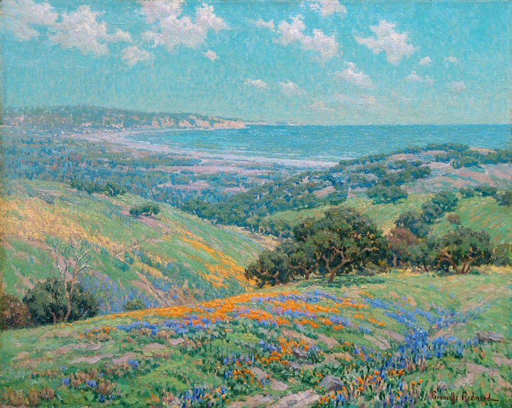 c. 1929